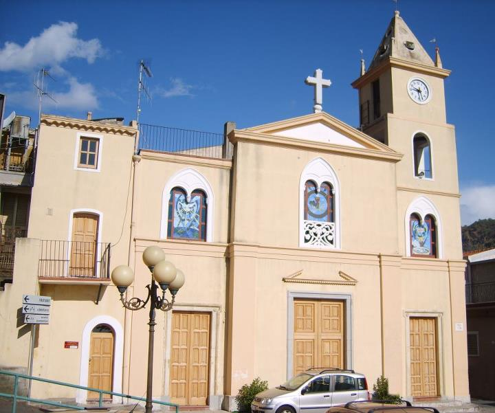 Chisa di San Vito a Misserio (1706)